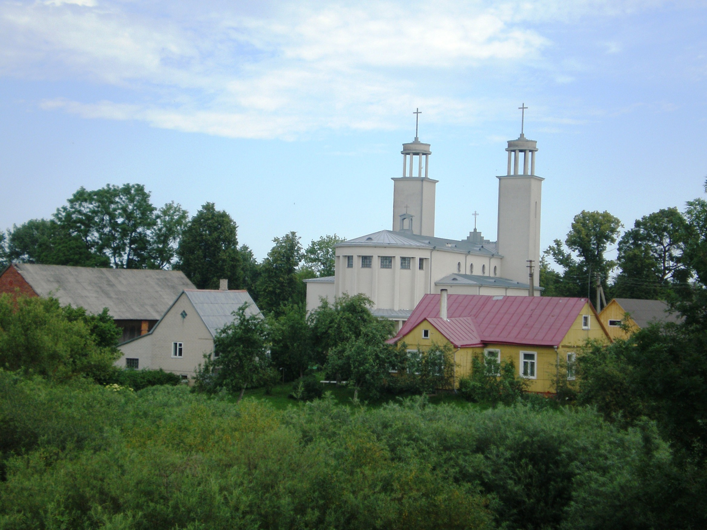 Pilviškiai, Vilkaviškio raj.